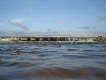 passagem